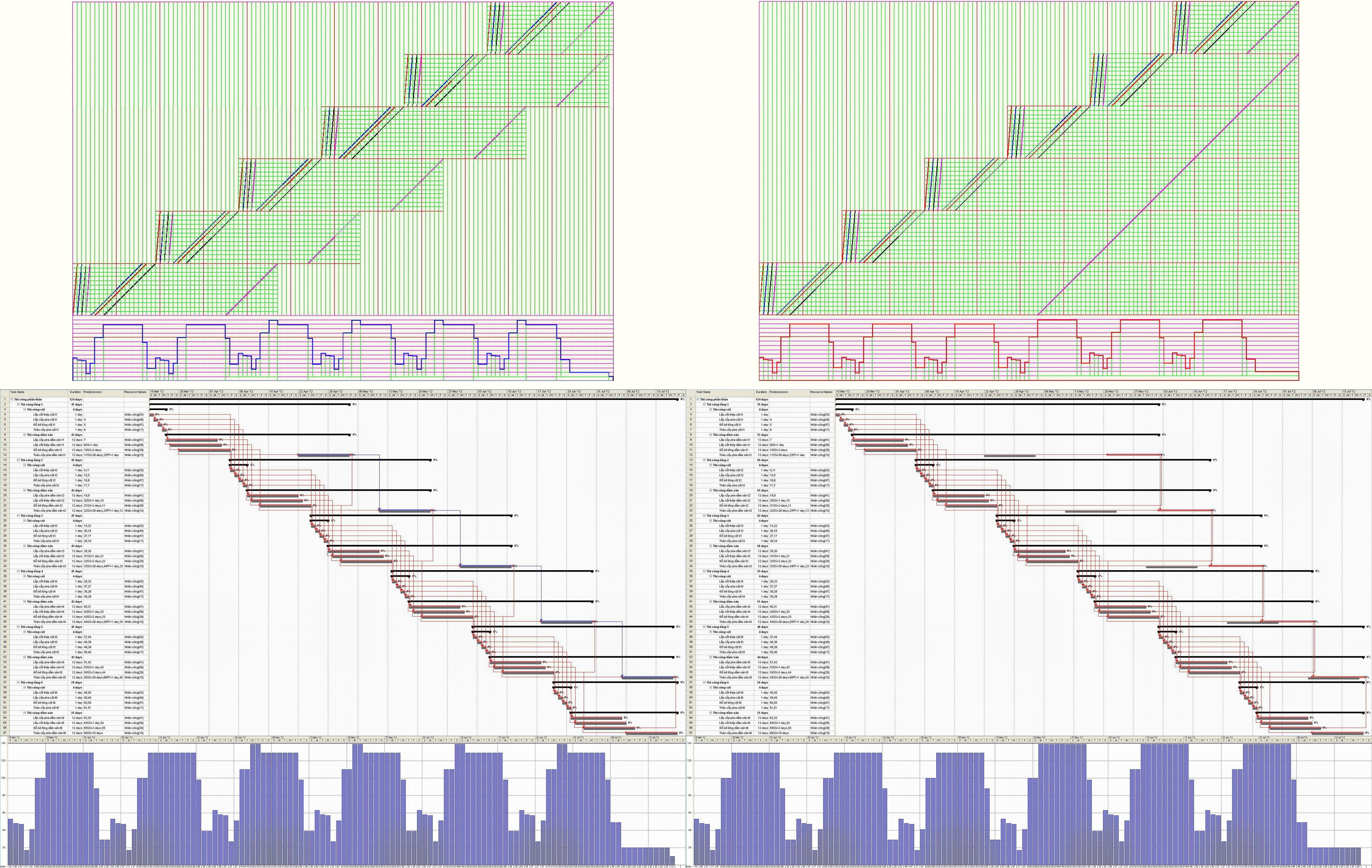 Tiến độ phần thân nhà nhiều tầng được tổ chức thực hiện theo phương pháp tổ đội chuyên môn.